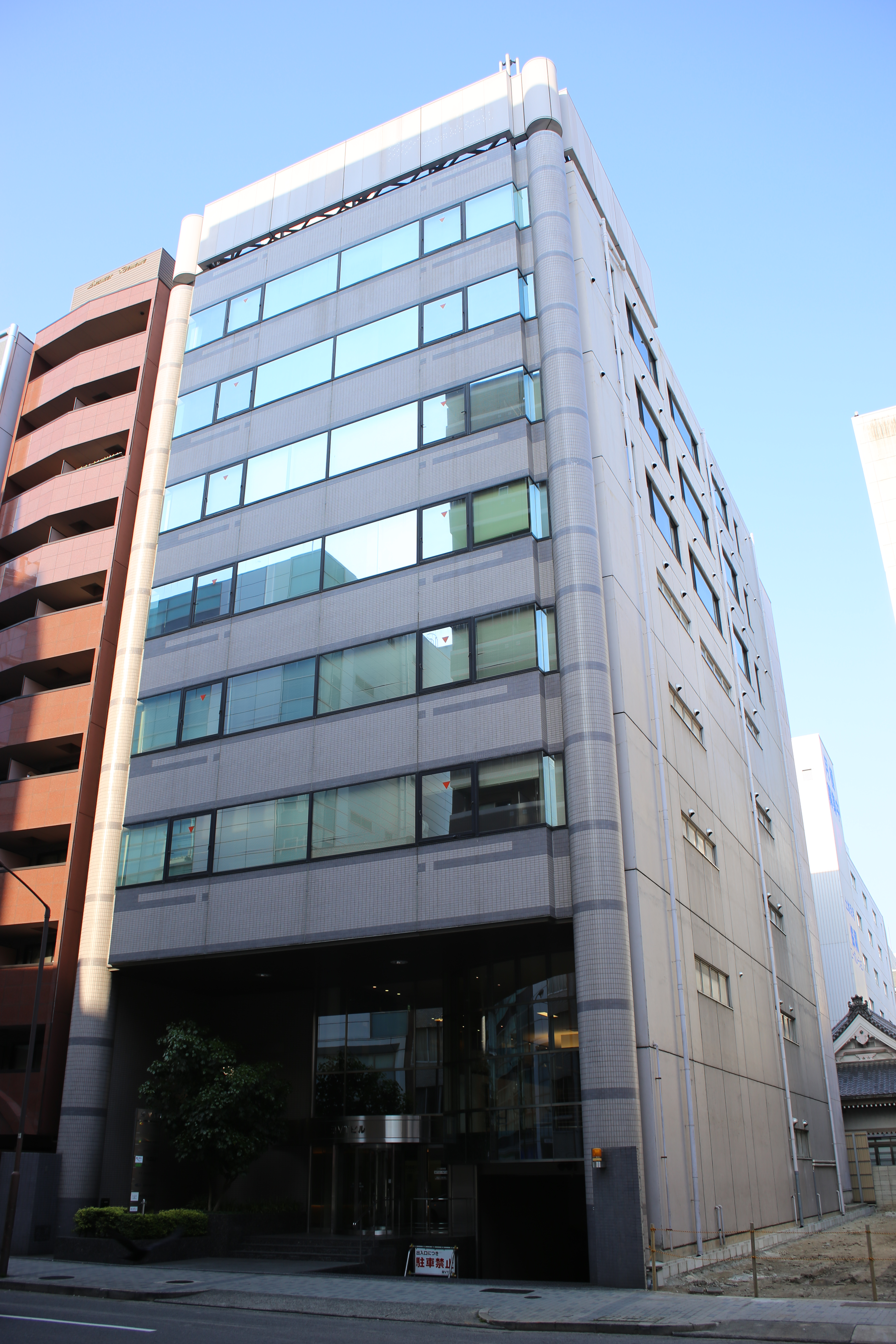 名古屋市中区錦三丁目の栄VTビルを西側公道を南側より撮影